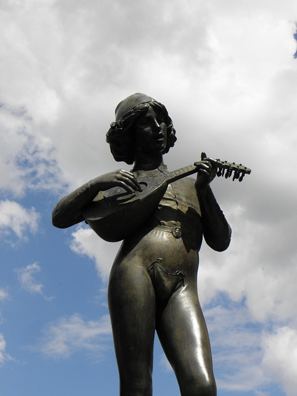 Chanteur florentin. Statue de Paul Dubois (1829, Nogent-sur-Seine-1905, Paris), place Saint-Nizier à Troyes (10).